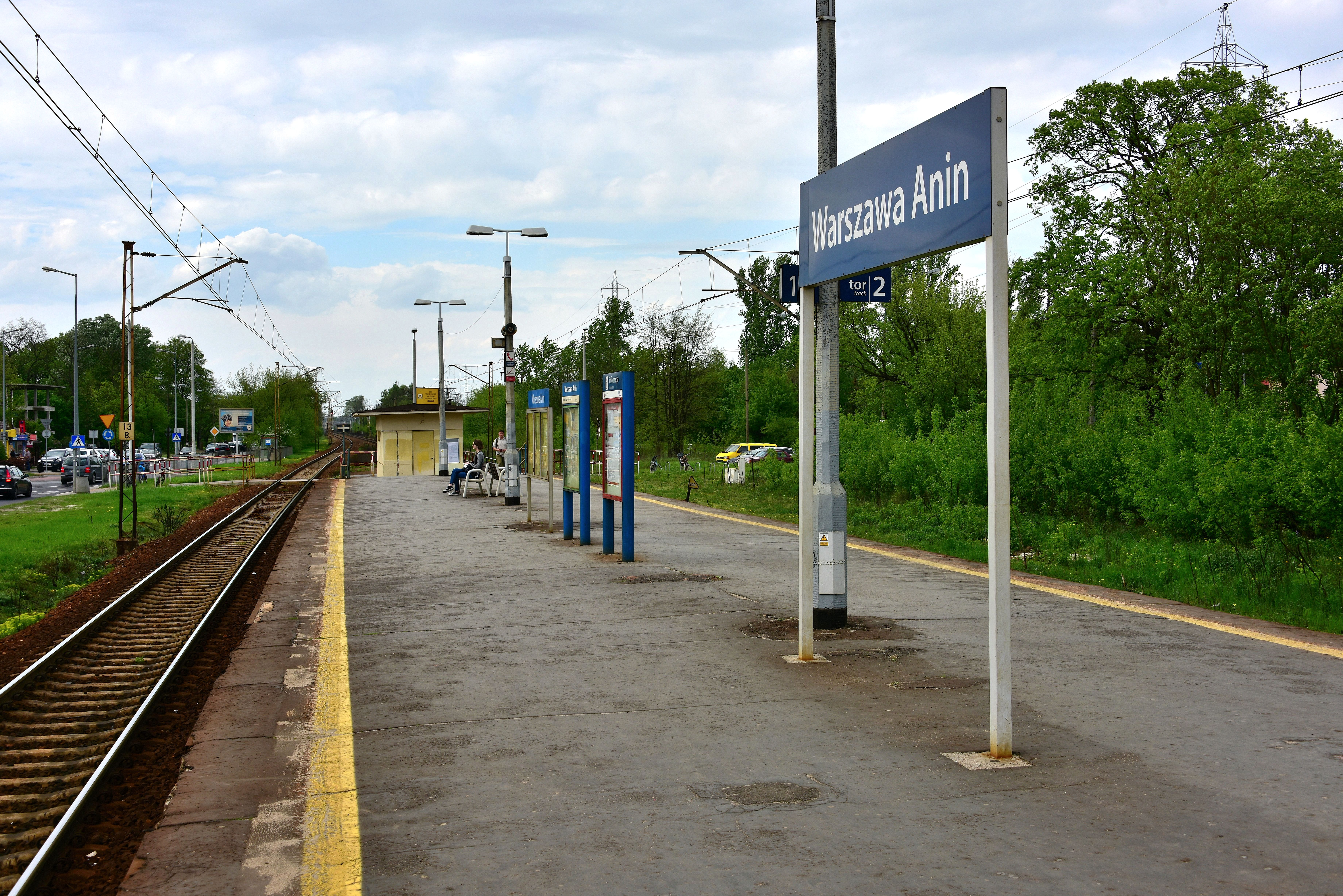 Przystanek kolejowy Warszawa Anin